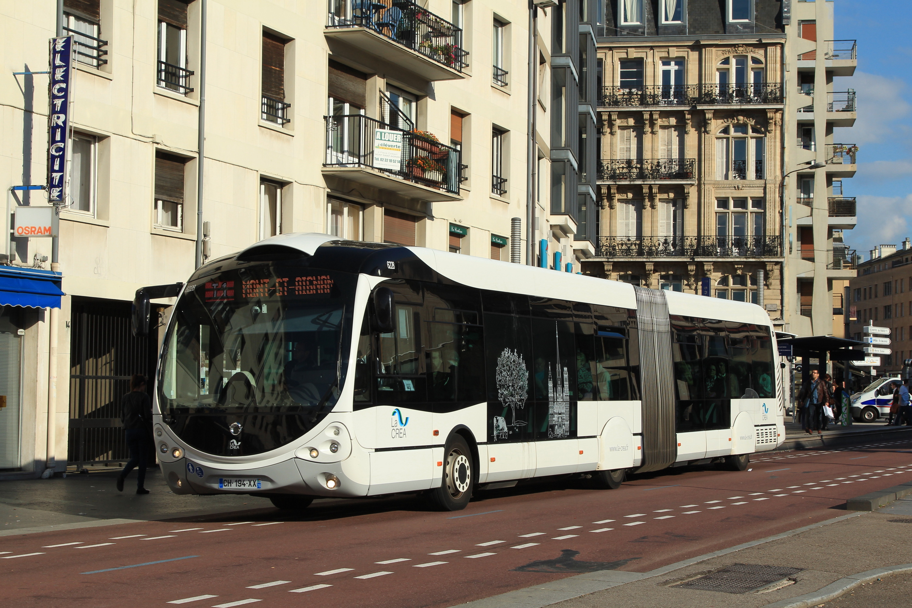 Bus Crealis n°6228 de Rouen à la station Théâtre des arts.